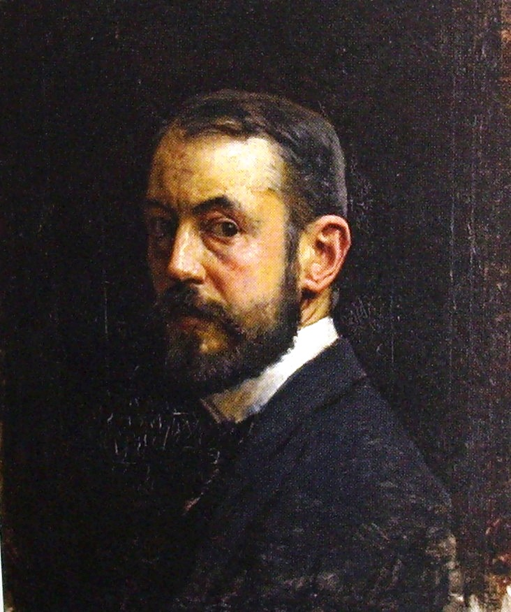 Autorretrato del pintor español José Moreno Carbonero (1860-1942).